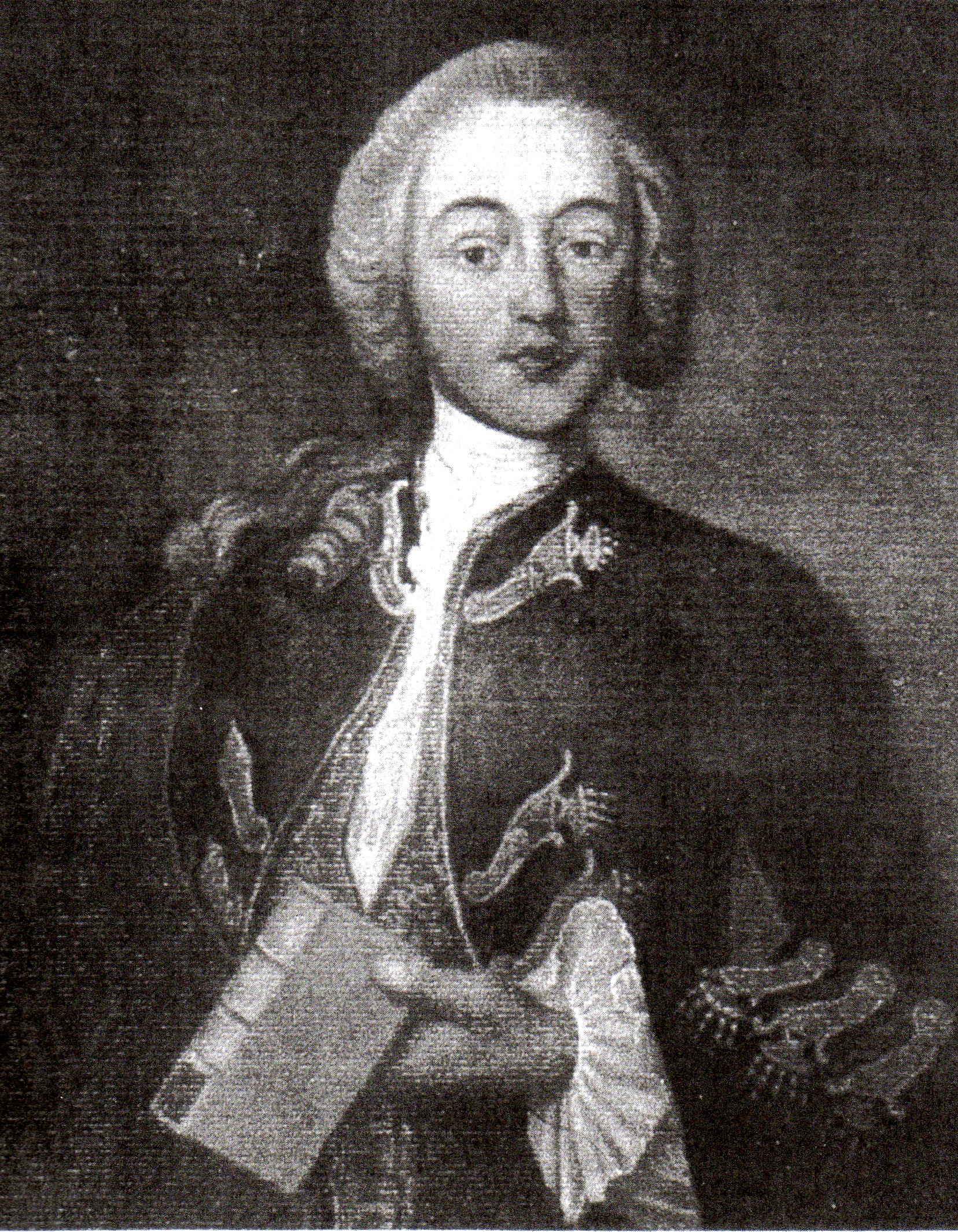 Friedrich Wilhelm Utsch